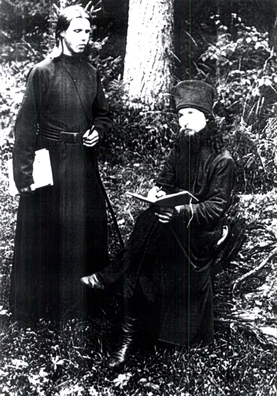 Неизвестный фотограф II половины XIX века. Иеромонах Алипий с учеником-послушником. Архив Ново-Валаамского монастыря